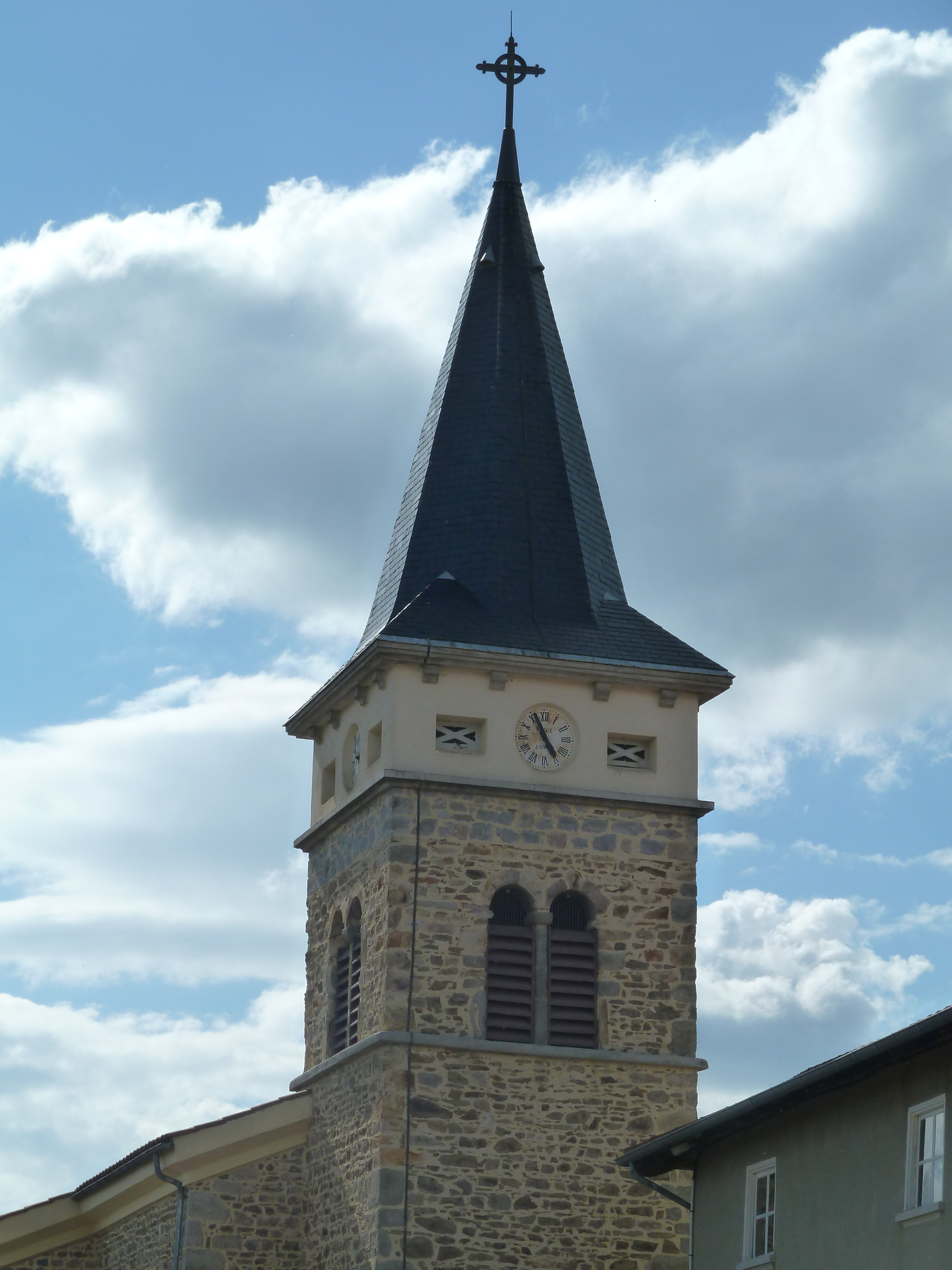 Clocher de l'église de Montchal (Loire)